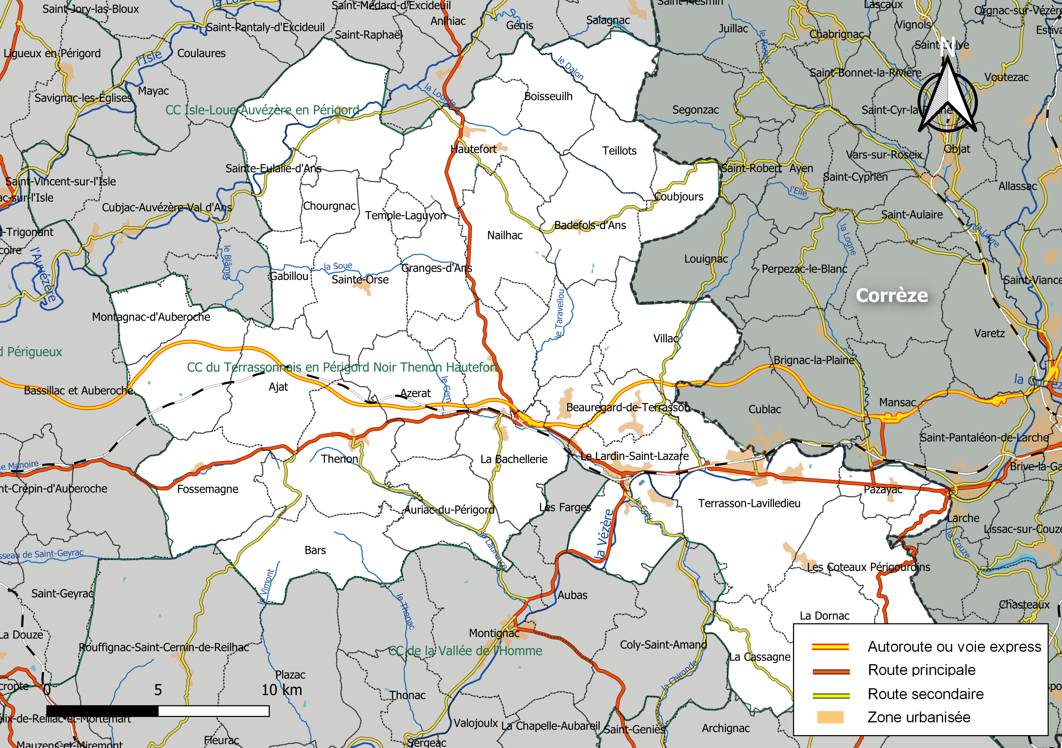 Carte géographique de la Communauté de communes du Terrassonnais en Périgord Noir Thenon Hautefort, département de la Dordogne, France. Composition au 1er janvier 2019.